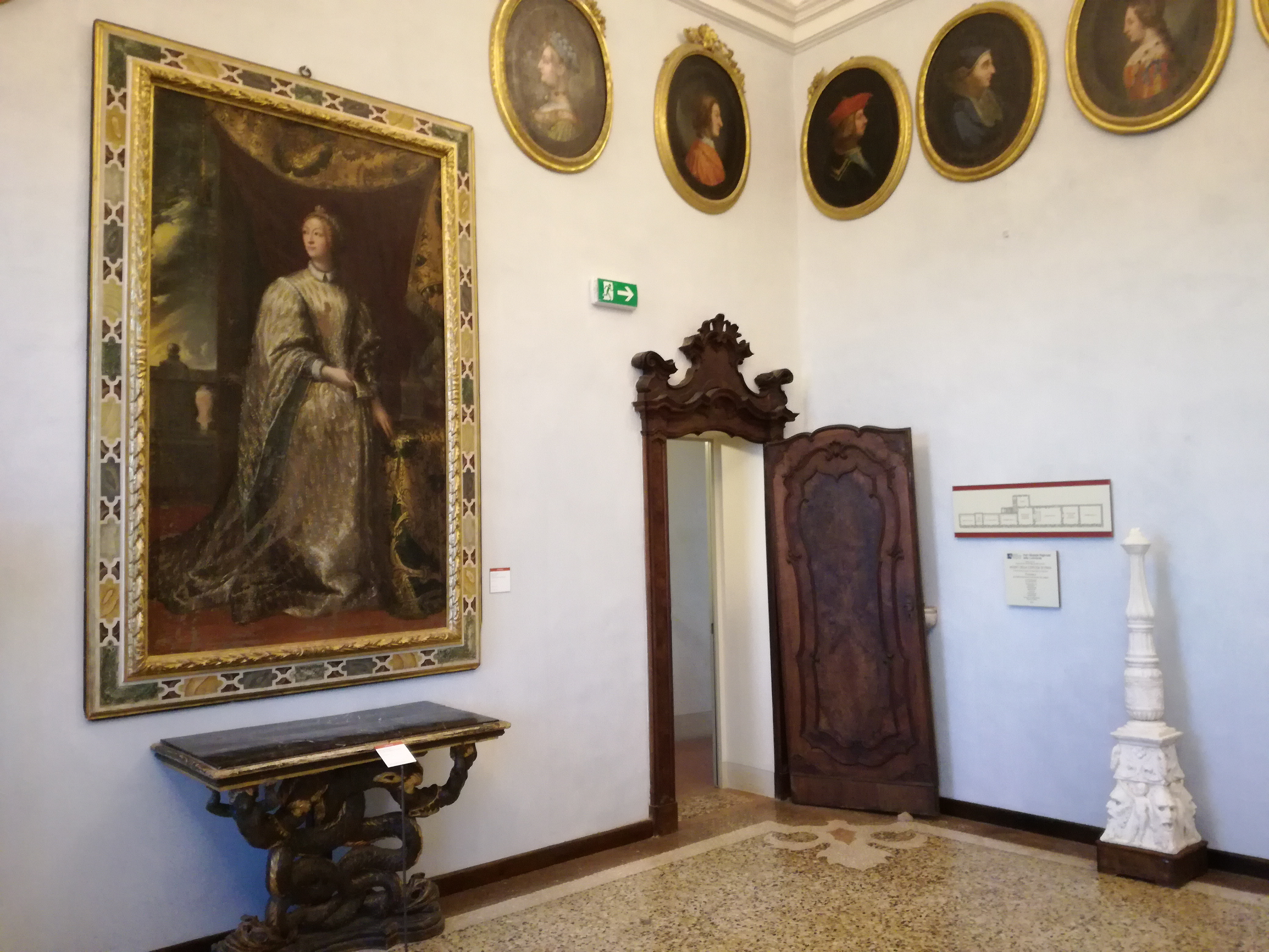 Museo della Certosa di Pavia, Il dipinto ritrae Caterina di Bernabò Visconti, sposata in seconde nozze con Gian Galeazzo Visconti (1371-1402)